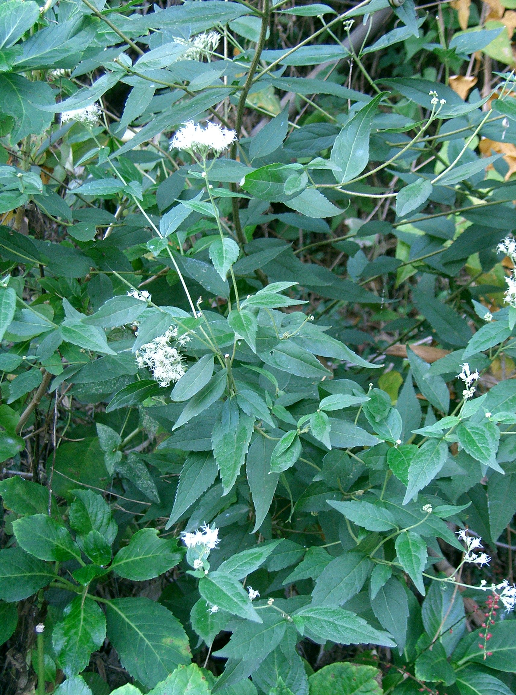 Eupatorium makinoi